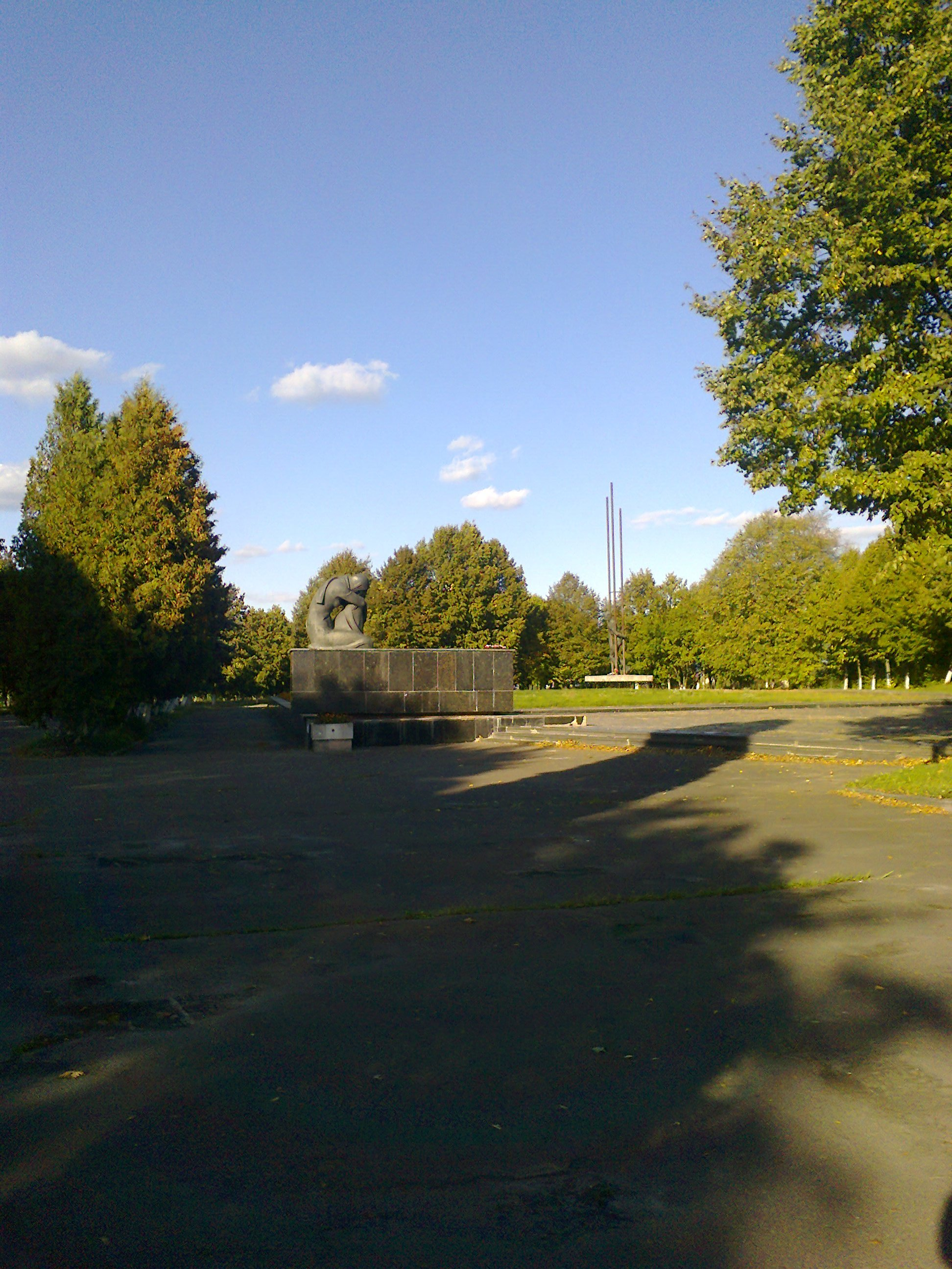 Меморіальний комплекс жертвам фашизму 1967р. м. Володимир-Волинський. Західна околиця міста.